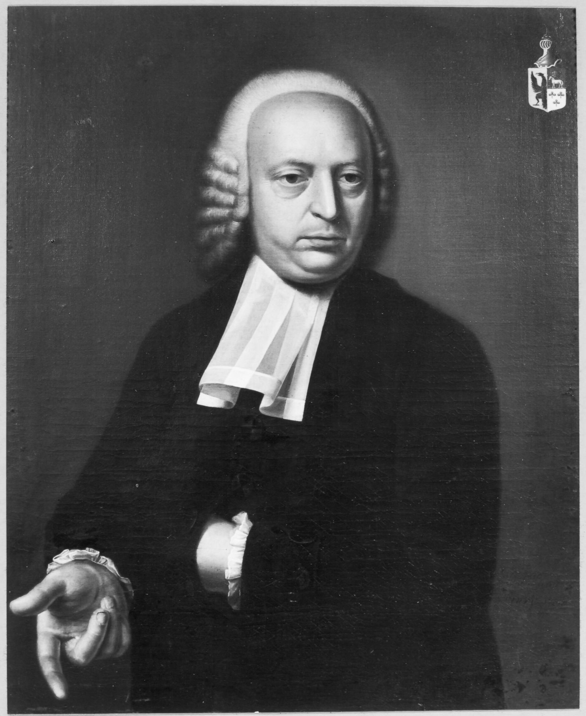 Mr. Gerlacus Buma (1732-1807), advocaat, pensionaris van Leeuwarden en Dokkum en raadsheer van het Hof van Friesland